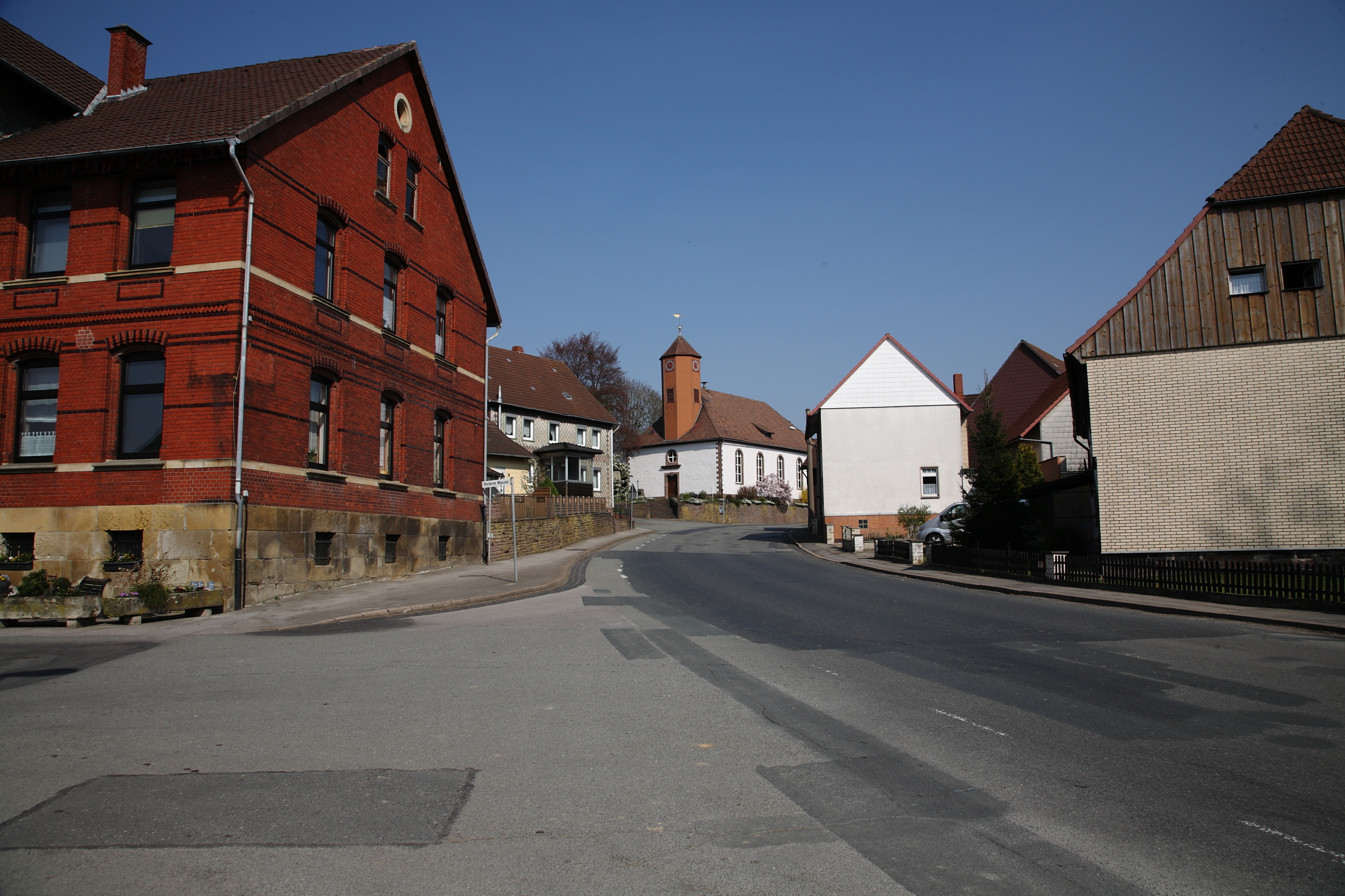 Wenzen - ein Dorf und nordwestlicher Ortsteil der Stadt Einbeck mit Blick auf die asphaltierte Landstraße erster Ordnung B64, eine sehr alte rheinische Heerstraße, und auf das evangelisch-lutherische Kirchengebäude St. Jacobi, einer kleinen Hallenkirche von 1804 mit kleinem achteckigem Turm, der aus der Dachschräge des Kirchenschiffs wächst. 2004 erhielt diese Kirche nach 80 Jahren neue Kirchenglocken aus Bronze. Roter Backsteinbau vorne links, ehemaliges Gasthaus Wiepert. Hier wurde der MTW Männerturnverein von 1903 gegründet.